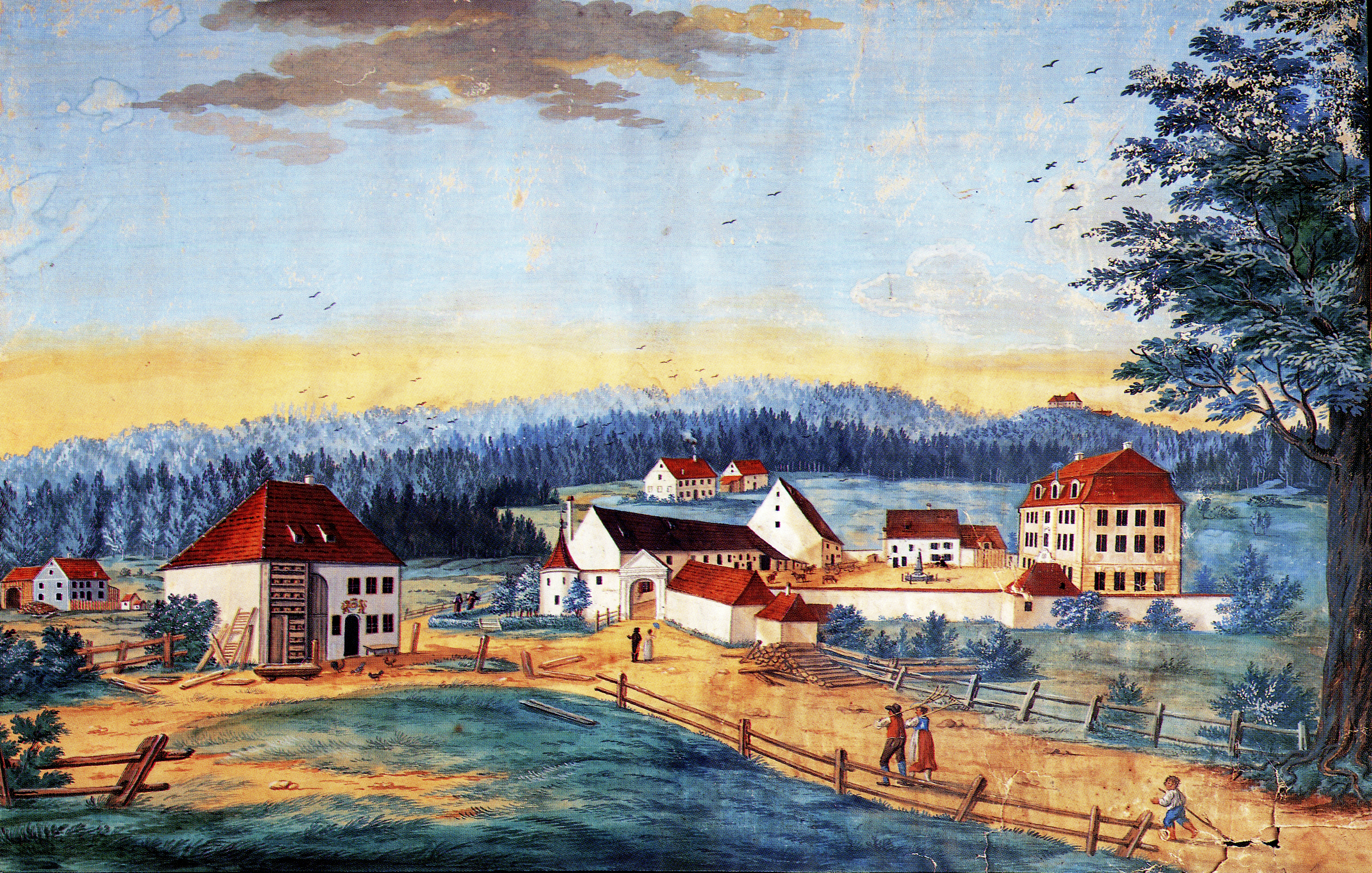 Schloss Grünenfurt um 1820. Gemalt von Elias Friedrich Küchlin, Aquarell und Kartusche. 39,5 x 61 Zentimeter (cm)